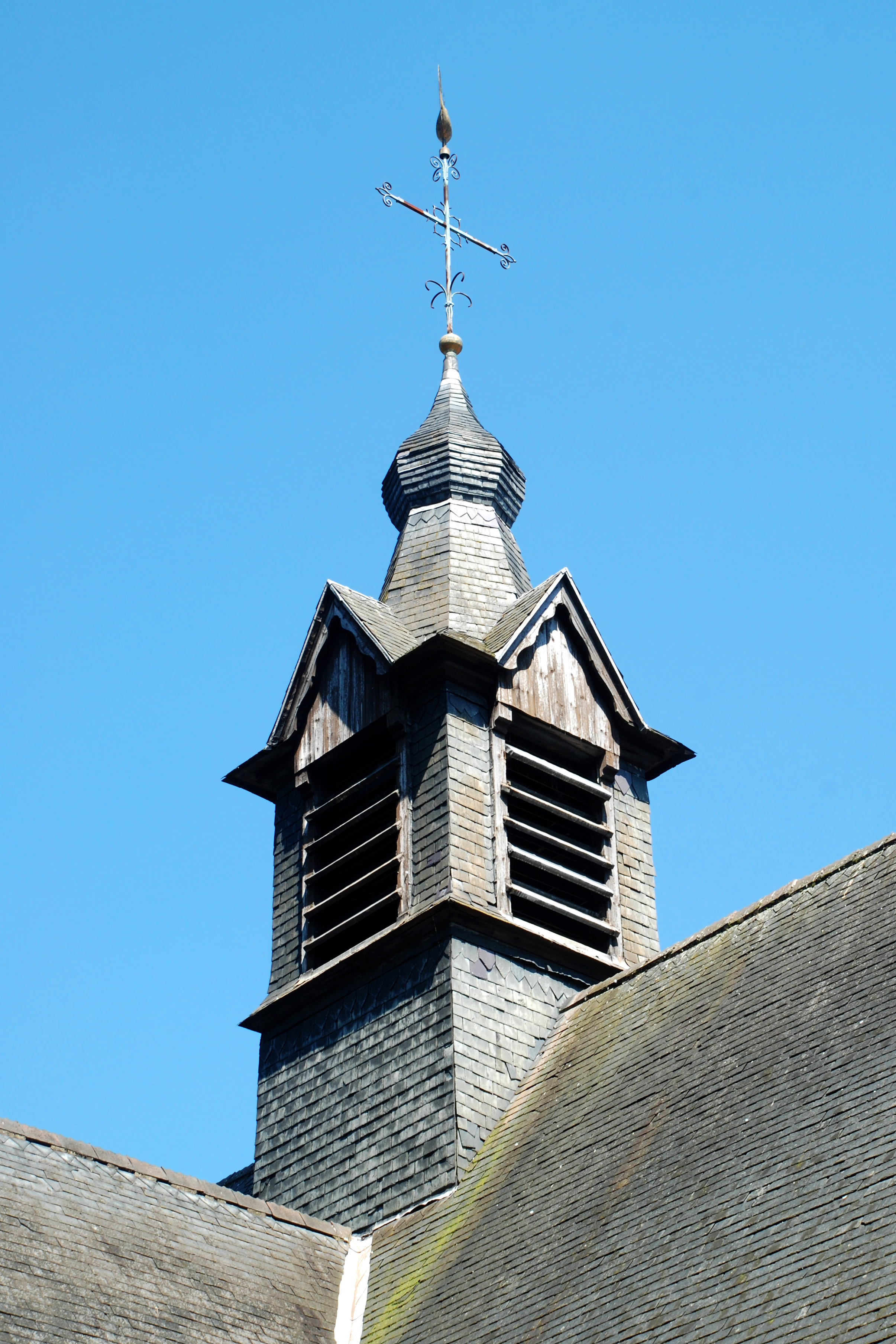 Belgique - Brabant wallon - Église Sainte-Croix de Rixensart